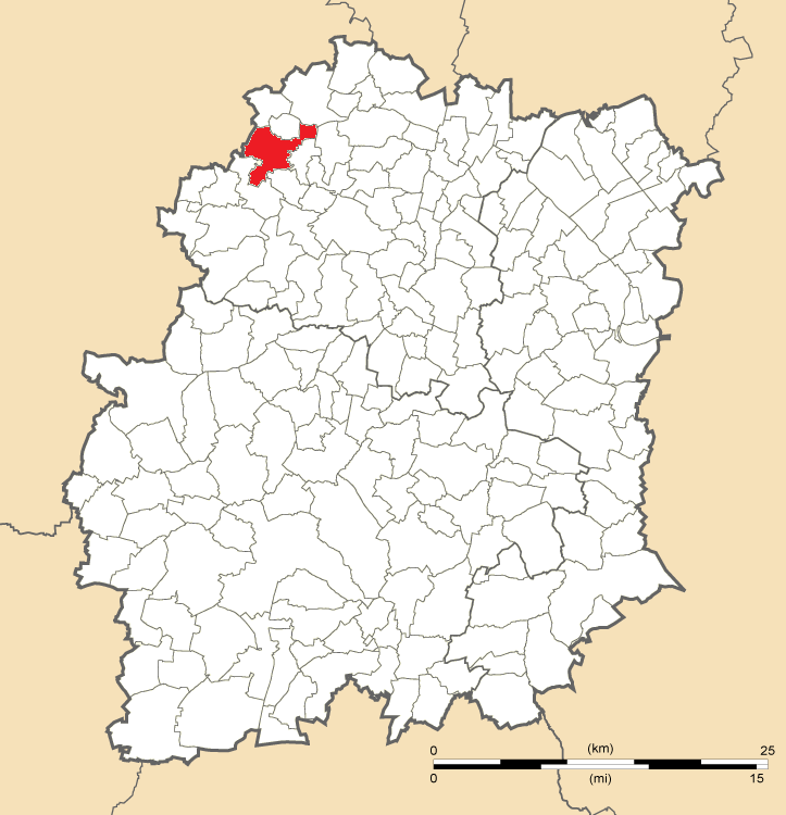 Carte de position de Gif-sur-Yvette en Essonne